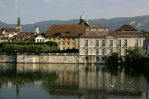 Solothurn: Zeitglockenturm, Palais Besenval